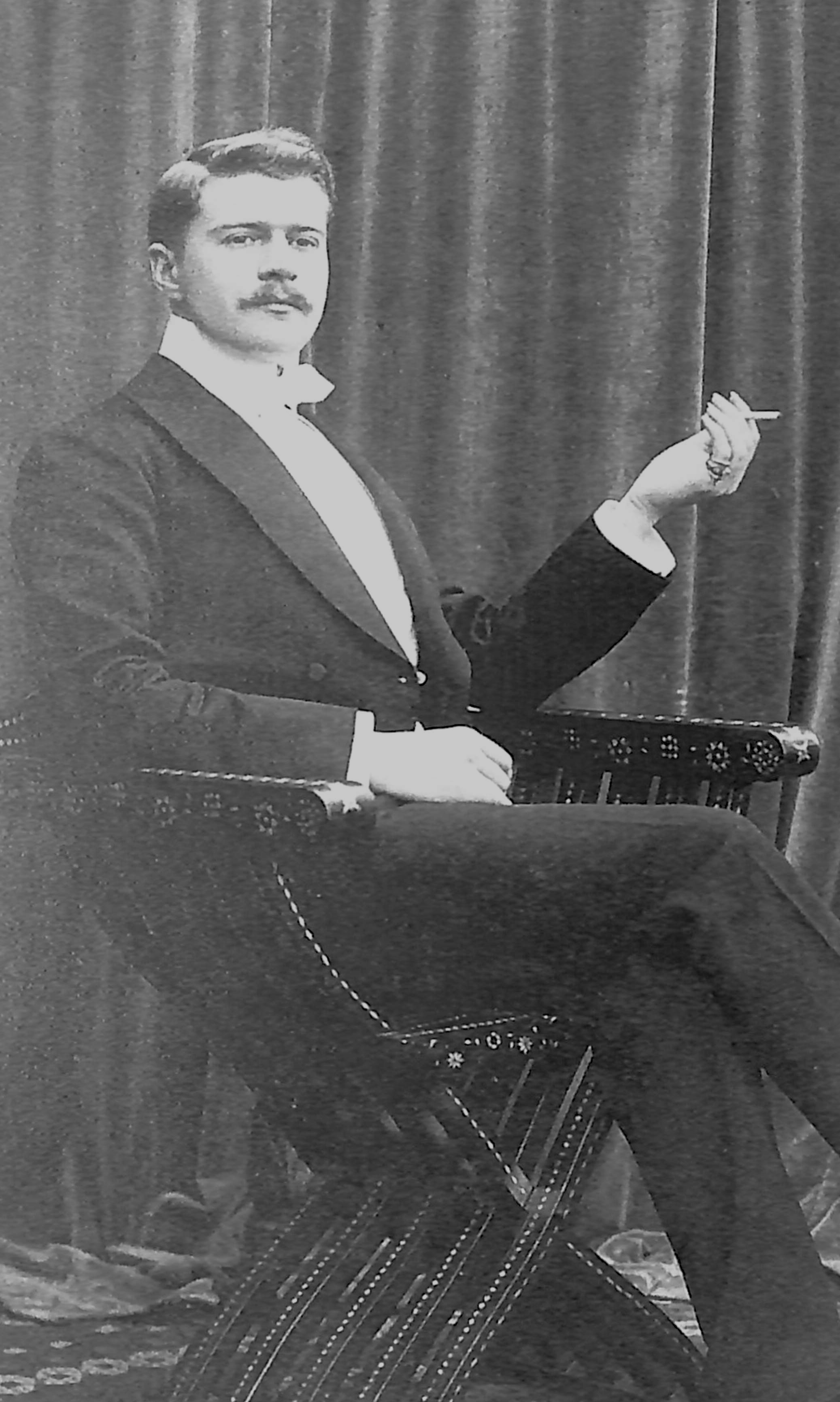 William Budzinski, deutscher Kostümbildner (1875-1950)